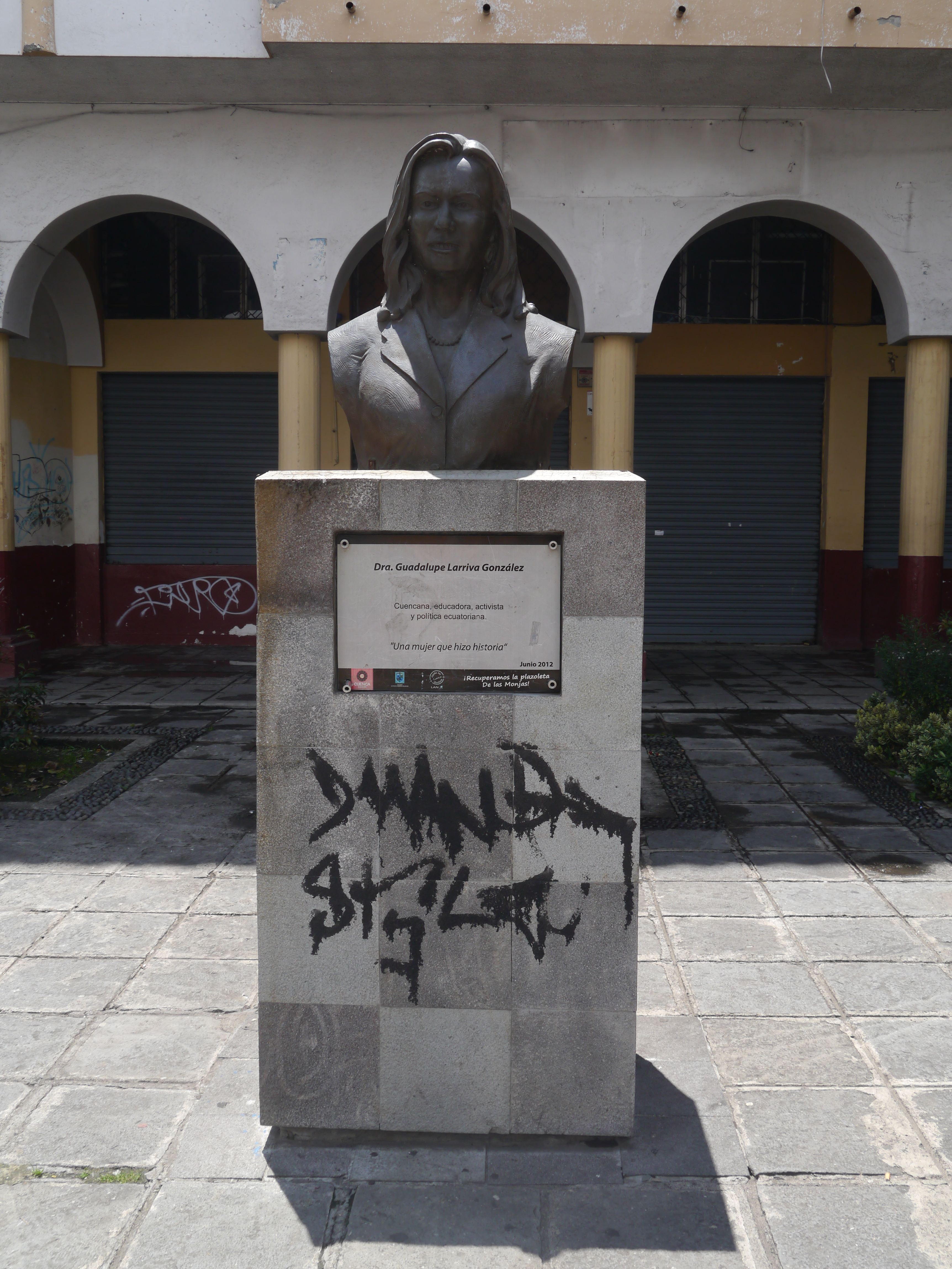 Busto de Guadalupe Larriva en Cuenca